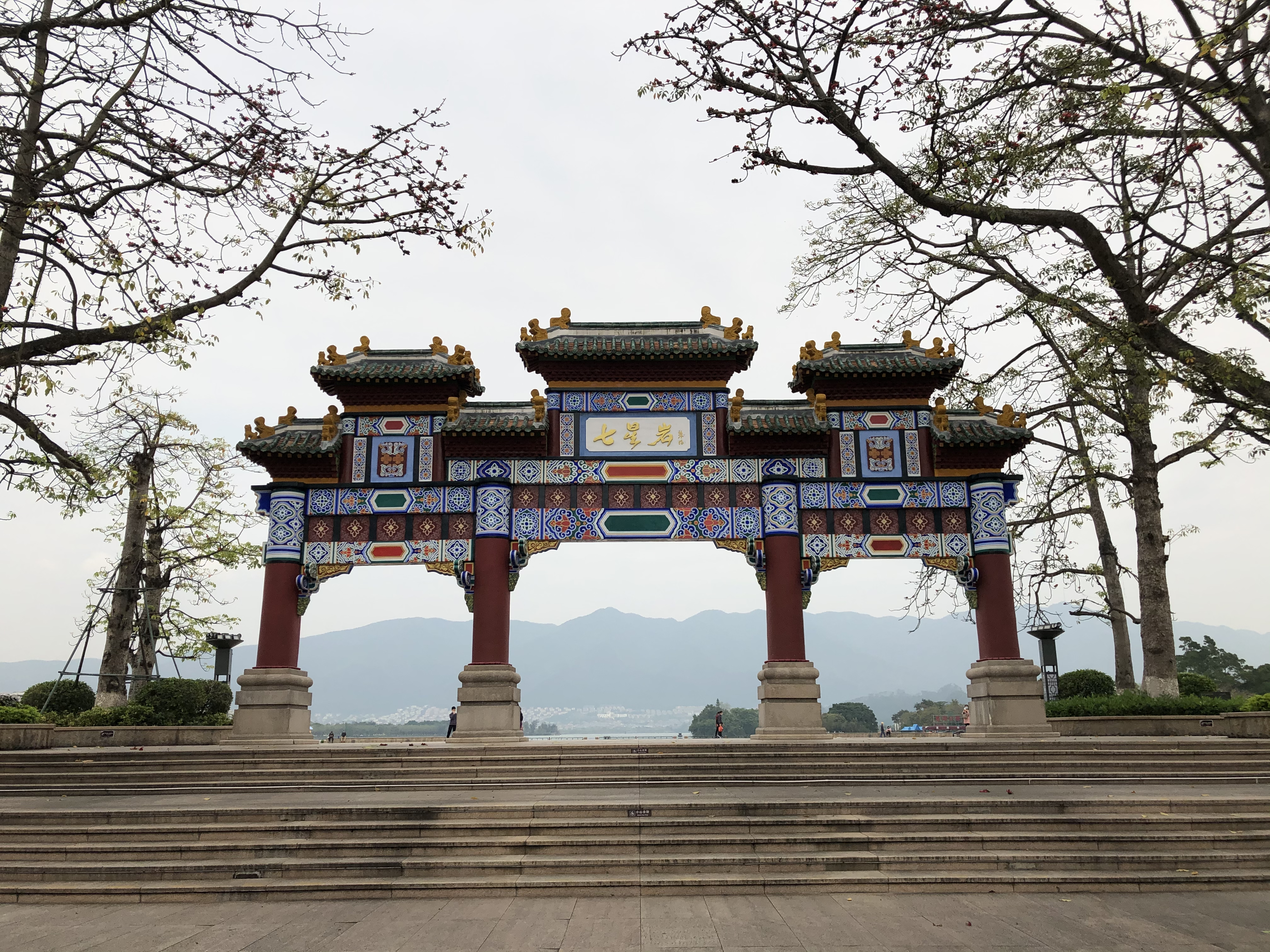 肇庆七星岩牌坊，拍摄于2020年4月。